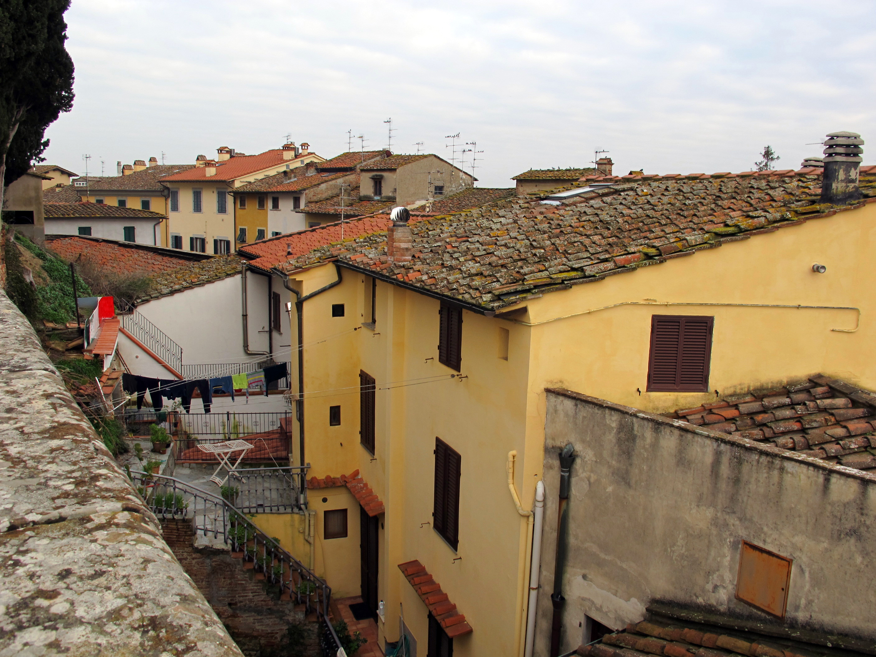 Cerreto guidi, veduta dei tetti